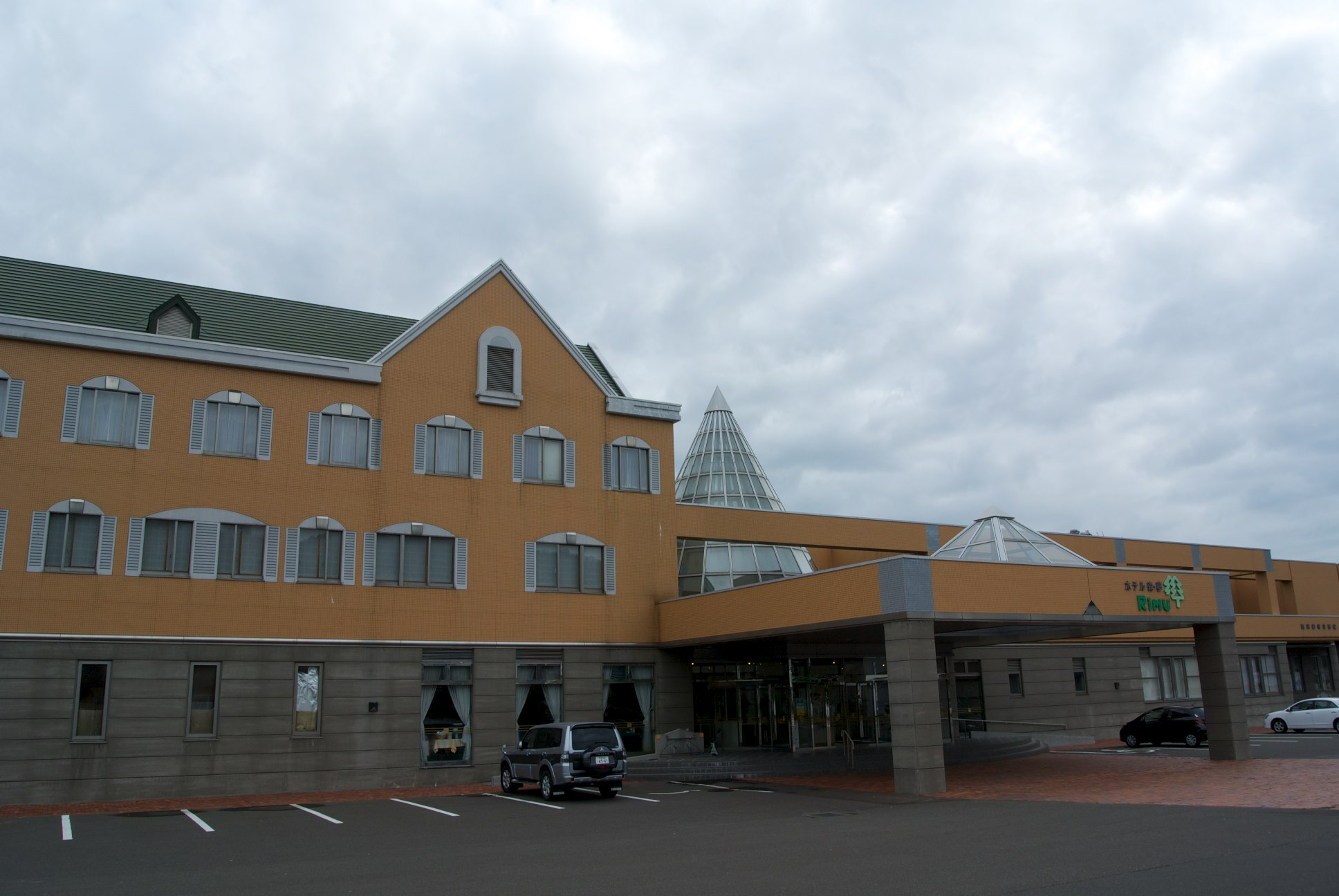 西興部のホテル林夢